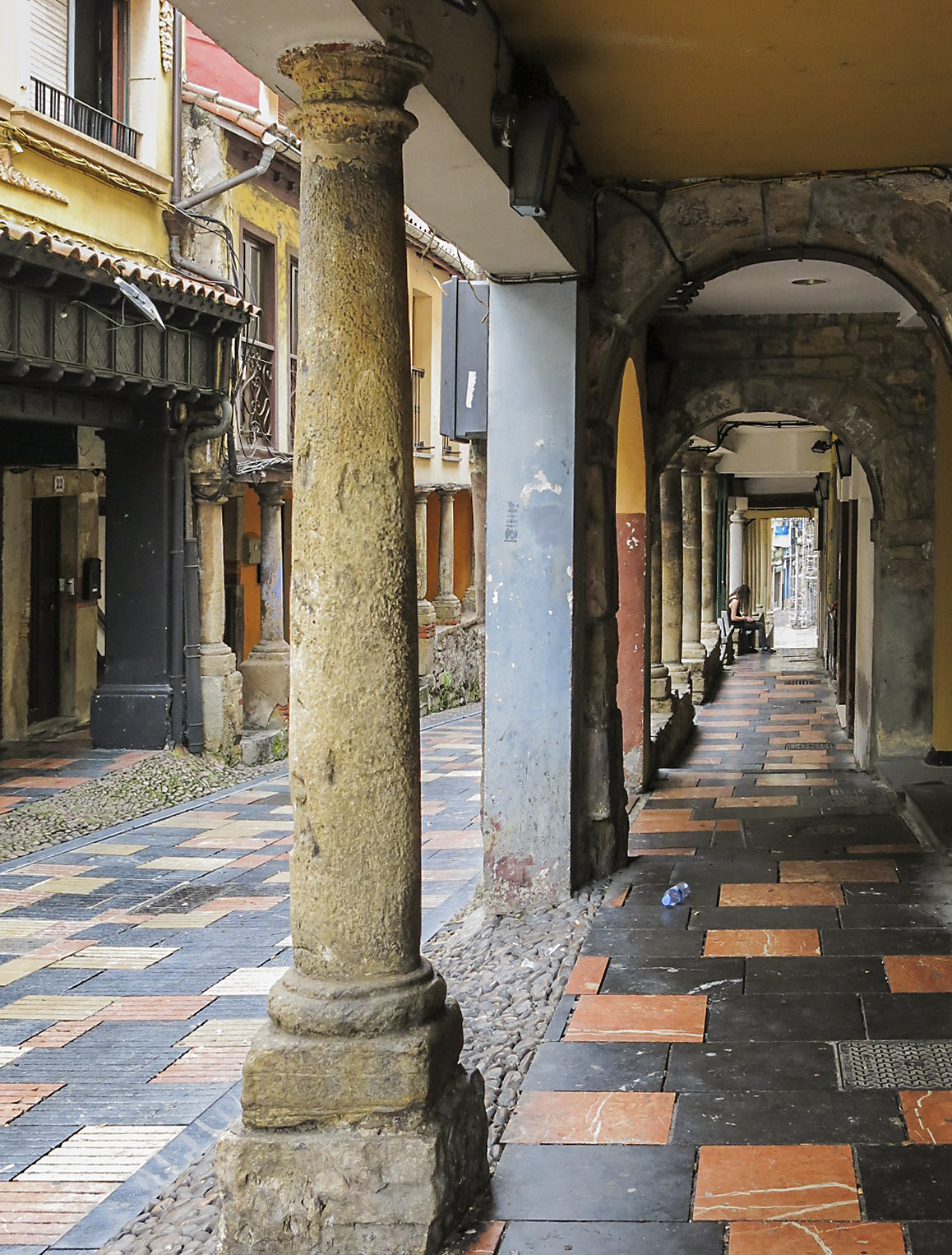 Projecte de col·laboració de l'Arxiu Ismael Latorre Mendoza amb Wikimedia Commons i Amical Wikimedia.